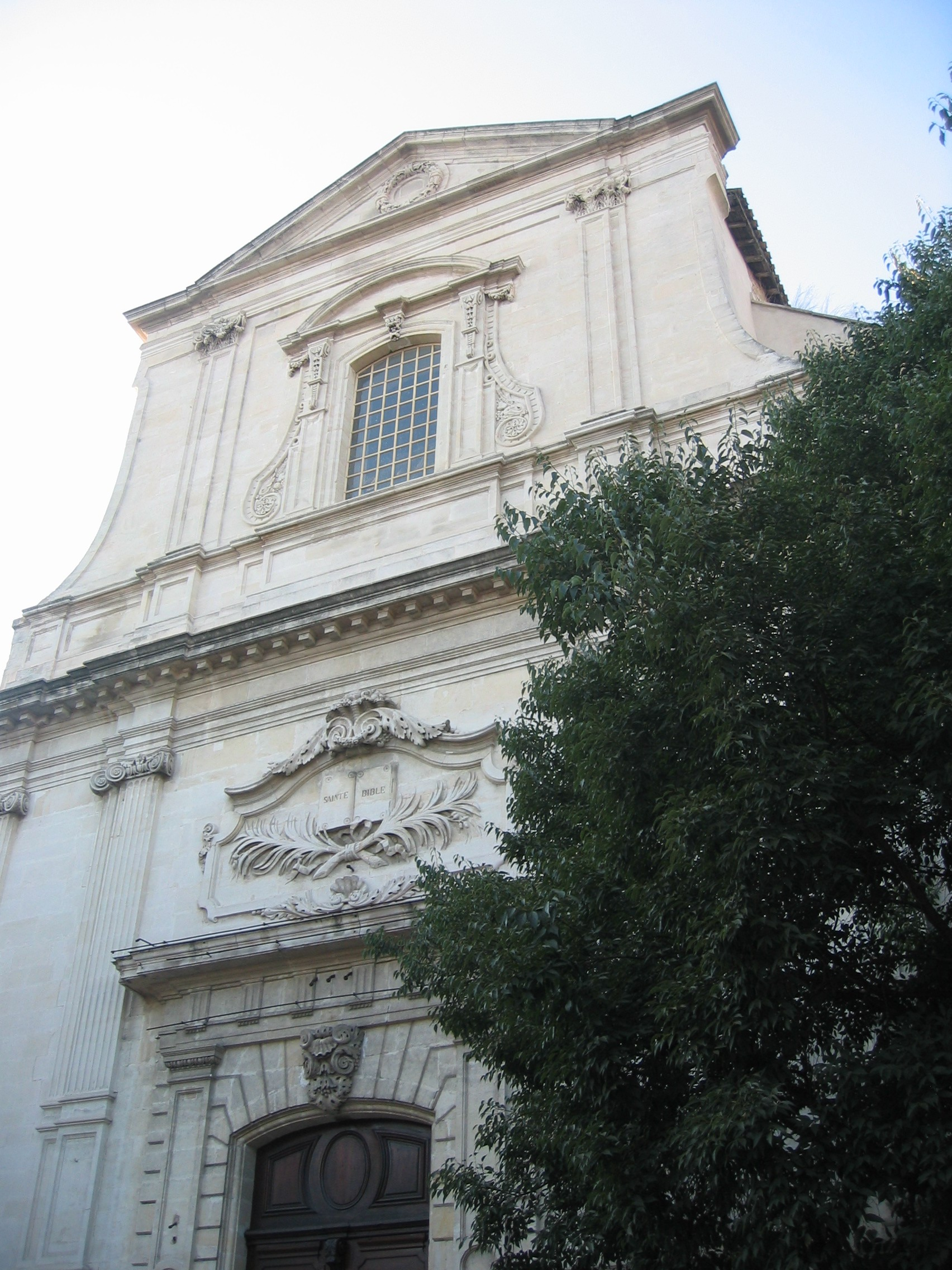 Le Grand Temple à Nîmes. Photo de Nicolas Cadène. Propre travail, redistribution à l'identique.